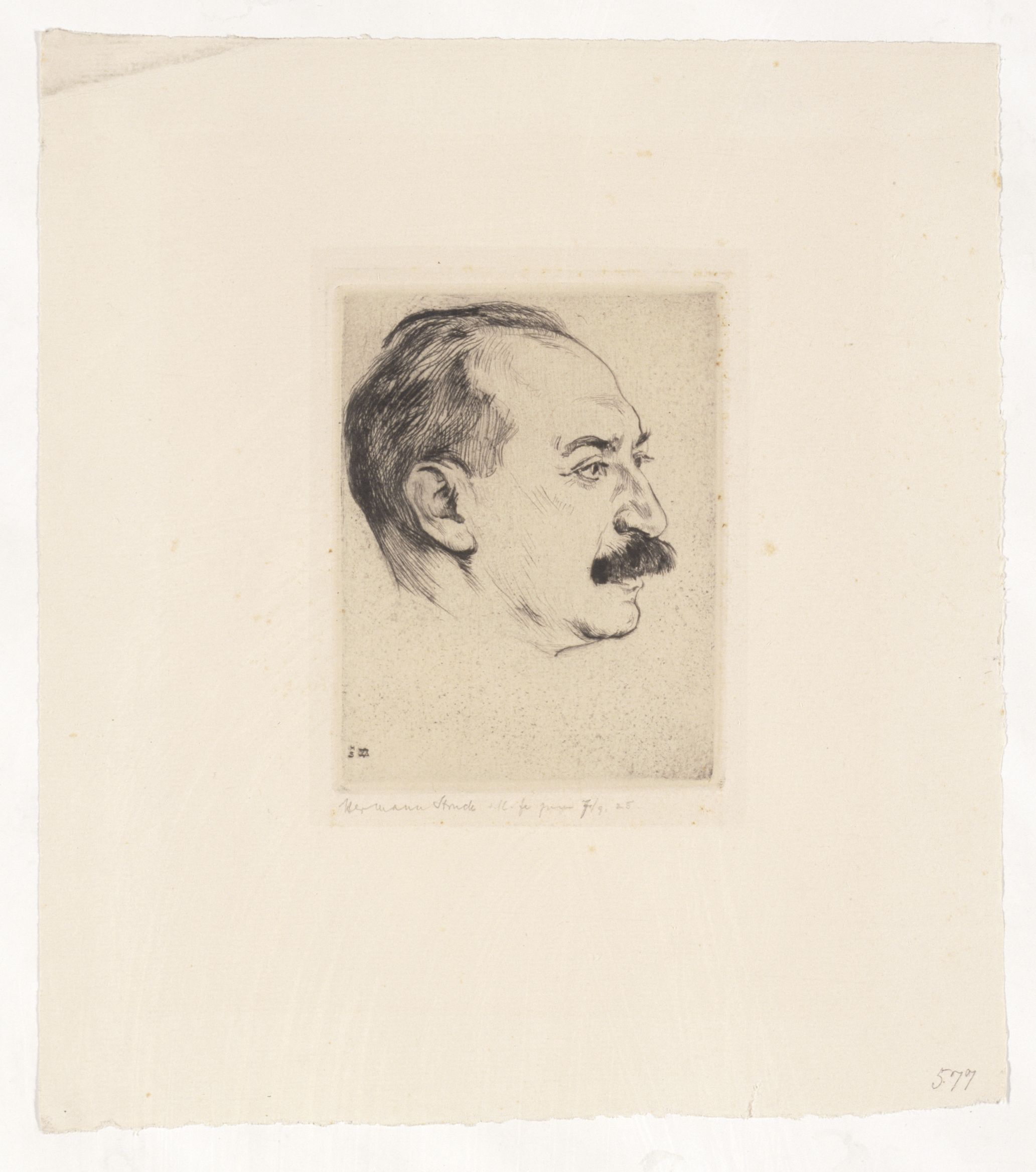 Artwork by Hermann Struck Dargestellte Person: Donath, Adolph (1876 - 1937), DNB-Link Datierung Display: ca. 1912 Objektart: Radierung Schlagworte Inhalt /Geografie: Mann, Porträt Schlagworte Kontext: Kunstkritiker